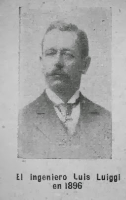 Ing. Luiggi en Caras y Caretas, 1896